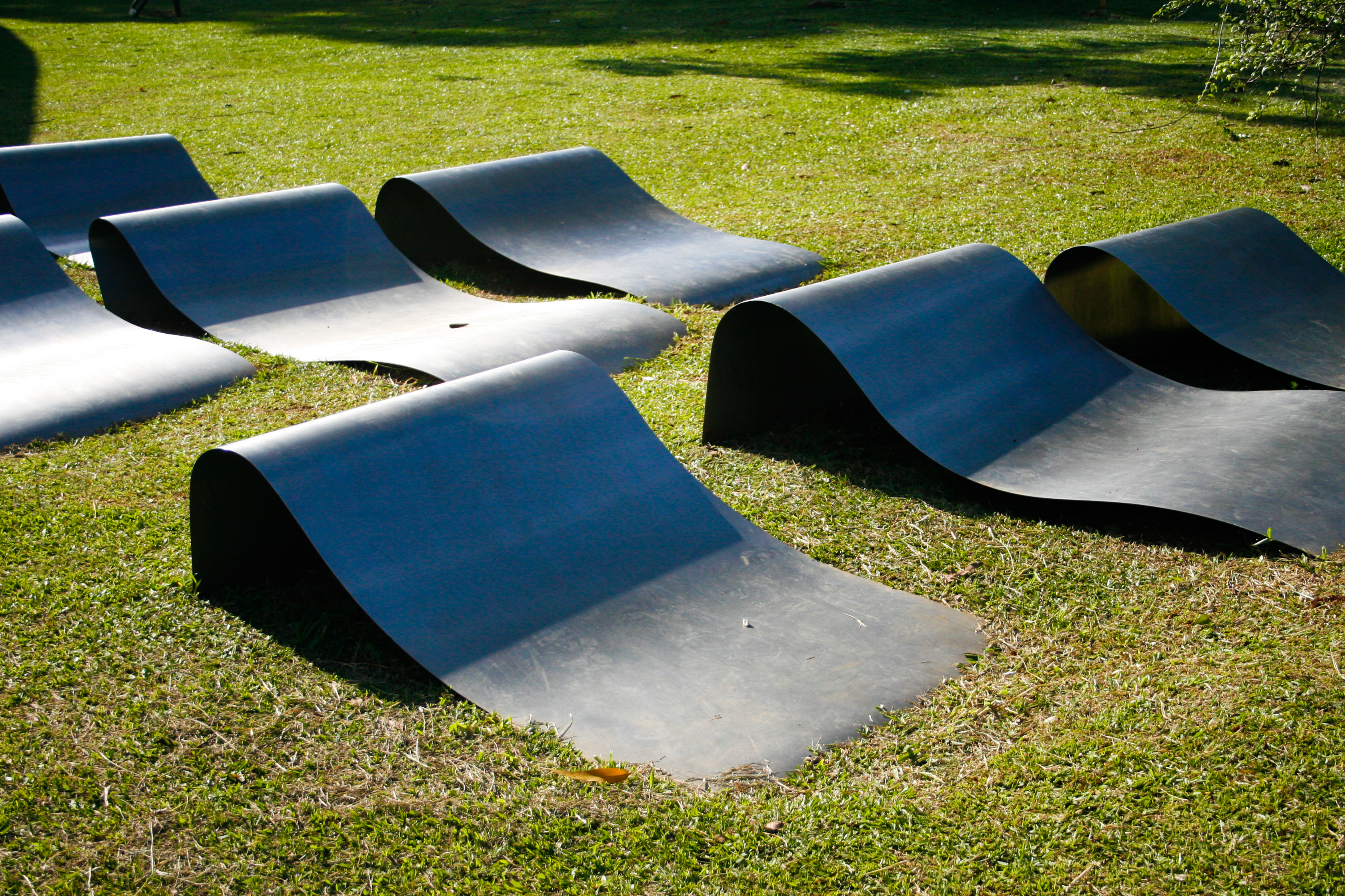 Parque Ibirapuera, Avenida Pedro Álvares Cabral, s/n. Foto por André Deak para o Arte Fora do Museu (